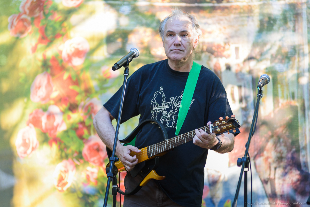 Алексей Иващенко. 44-й фестиваль авторской песни им. Валерия Грушина. Мастрюковские озера, Самарская область, Россия